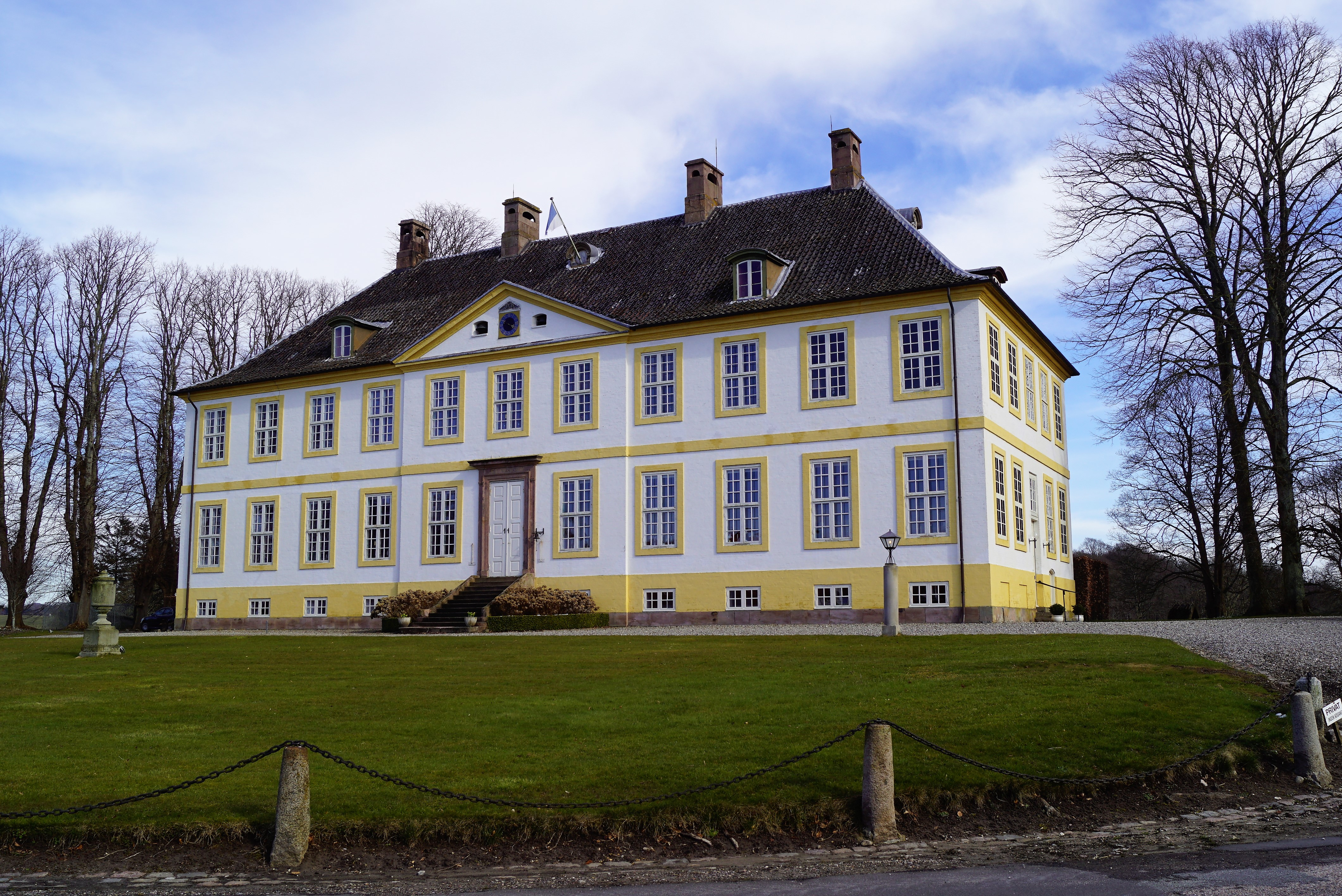 Hagenskov marts 2018